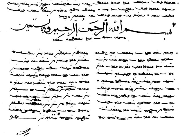 1890年発行のV.V.Radlov による『クタドゥグ＝ビリク』ウィーン本ファクシミリ版本文10頁のコピーからスキャン。